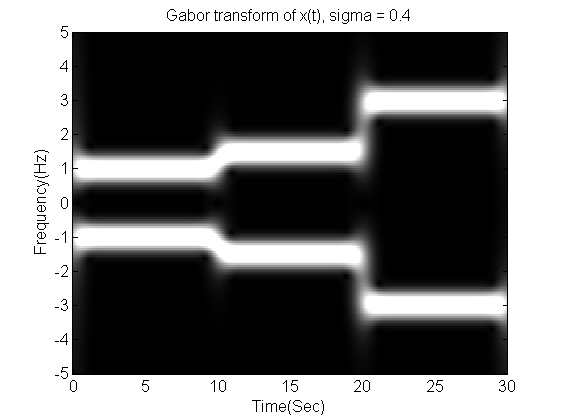 Gabor Transform with Sigma = 0.4